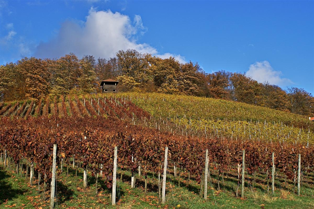 Ötisheim Schönenberg Weinberge mit Chartaque